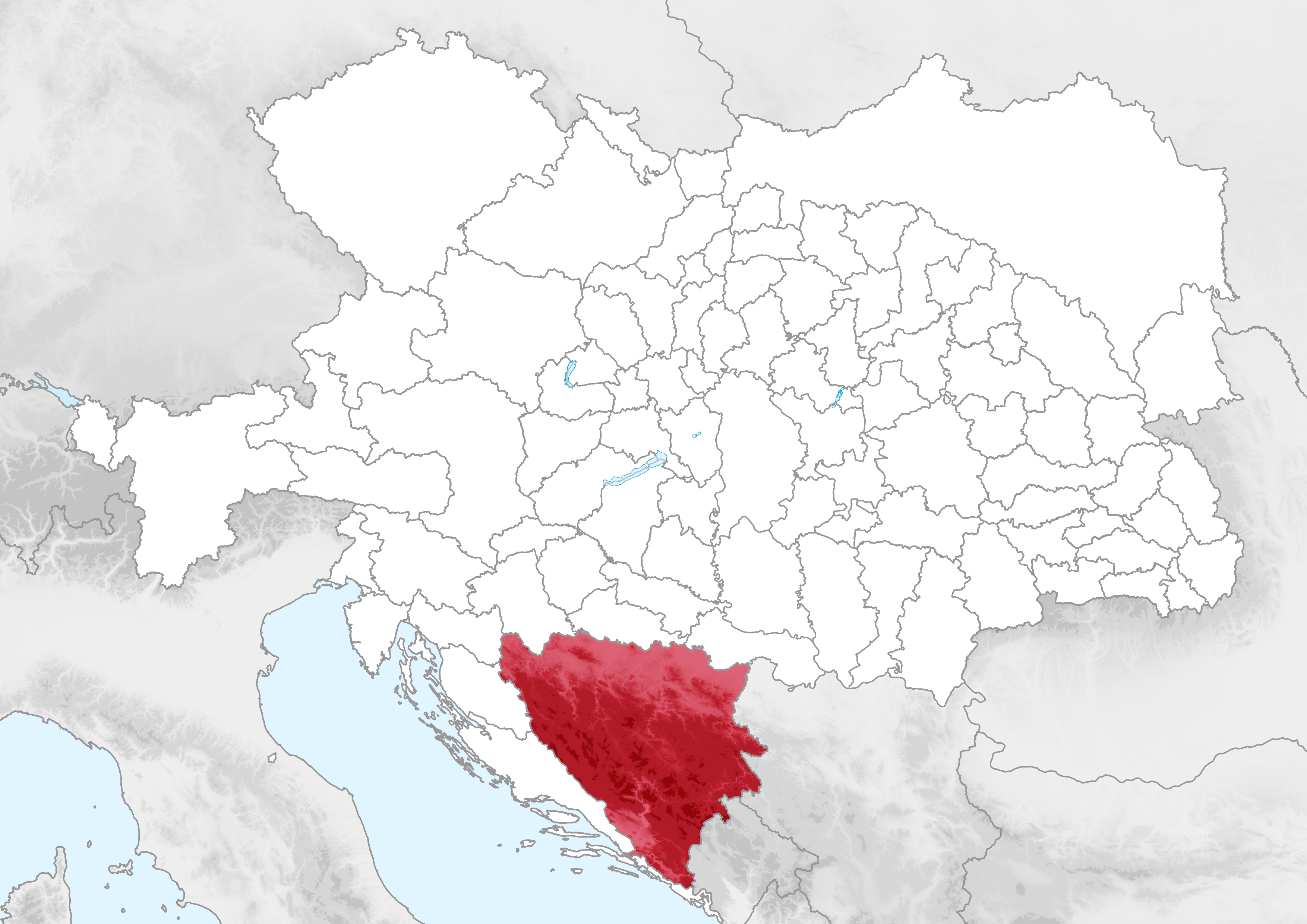 Carte de la Bosnie-Herzégovine au sein de l'Autriche-Hongrie